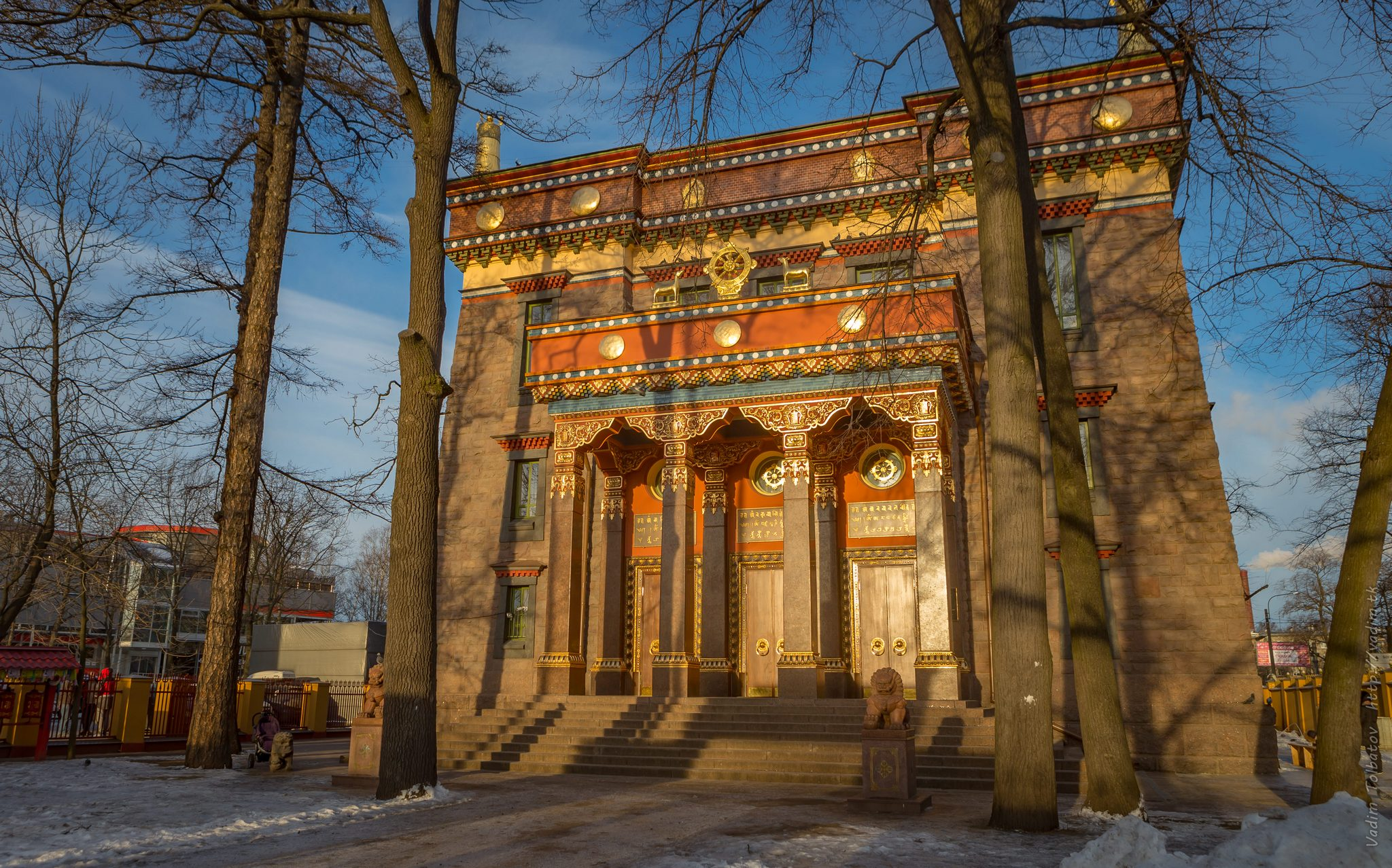 Фасад Дацана Гунзэчойнэй